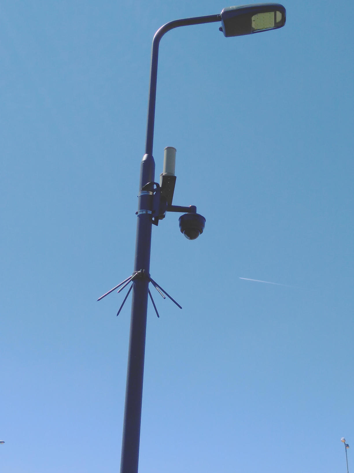 beveiligingscamera FastNed op snellaadstation de Poel